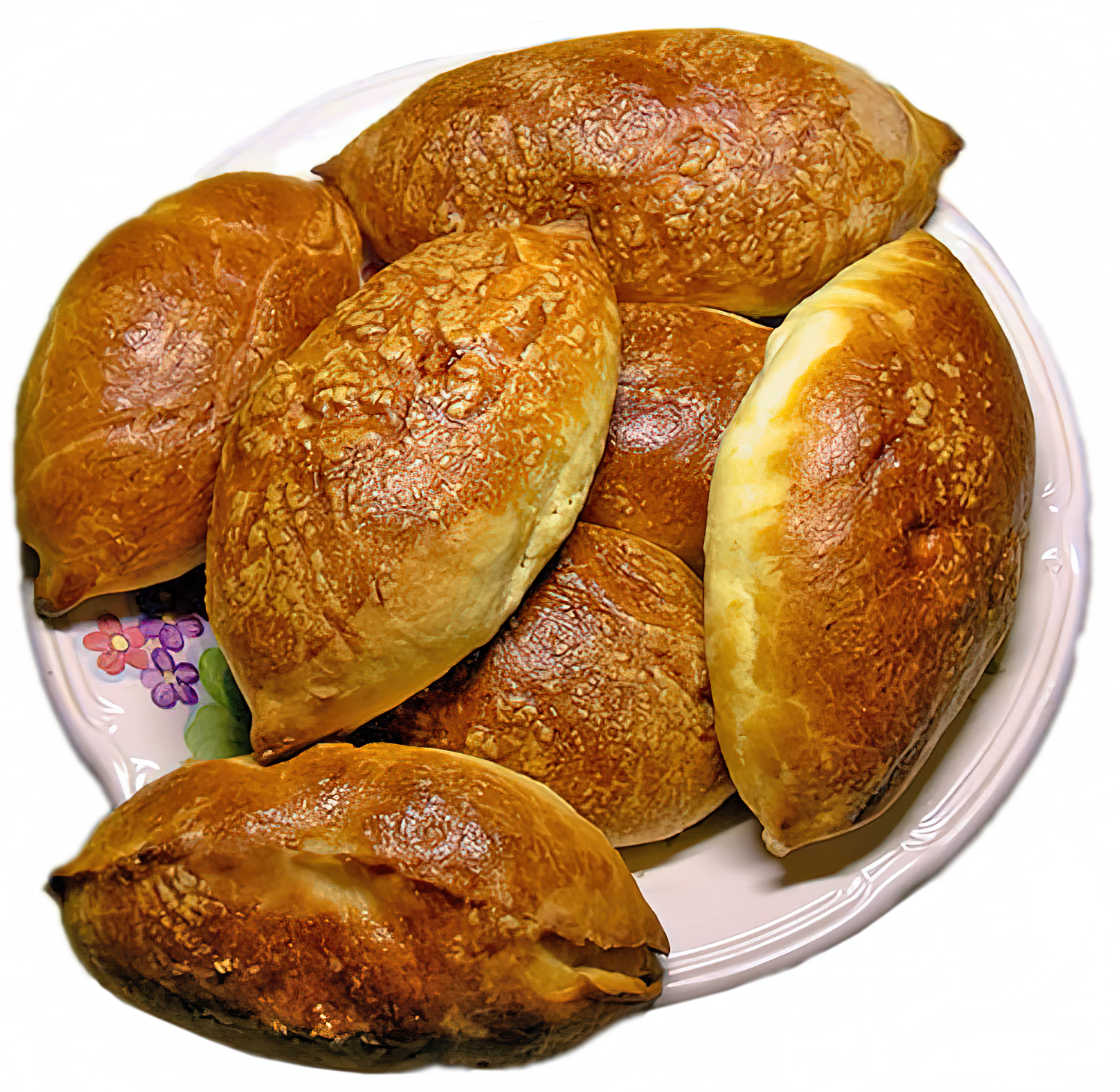 Пирожки/Russian pirozhki